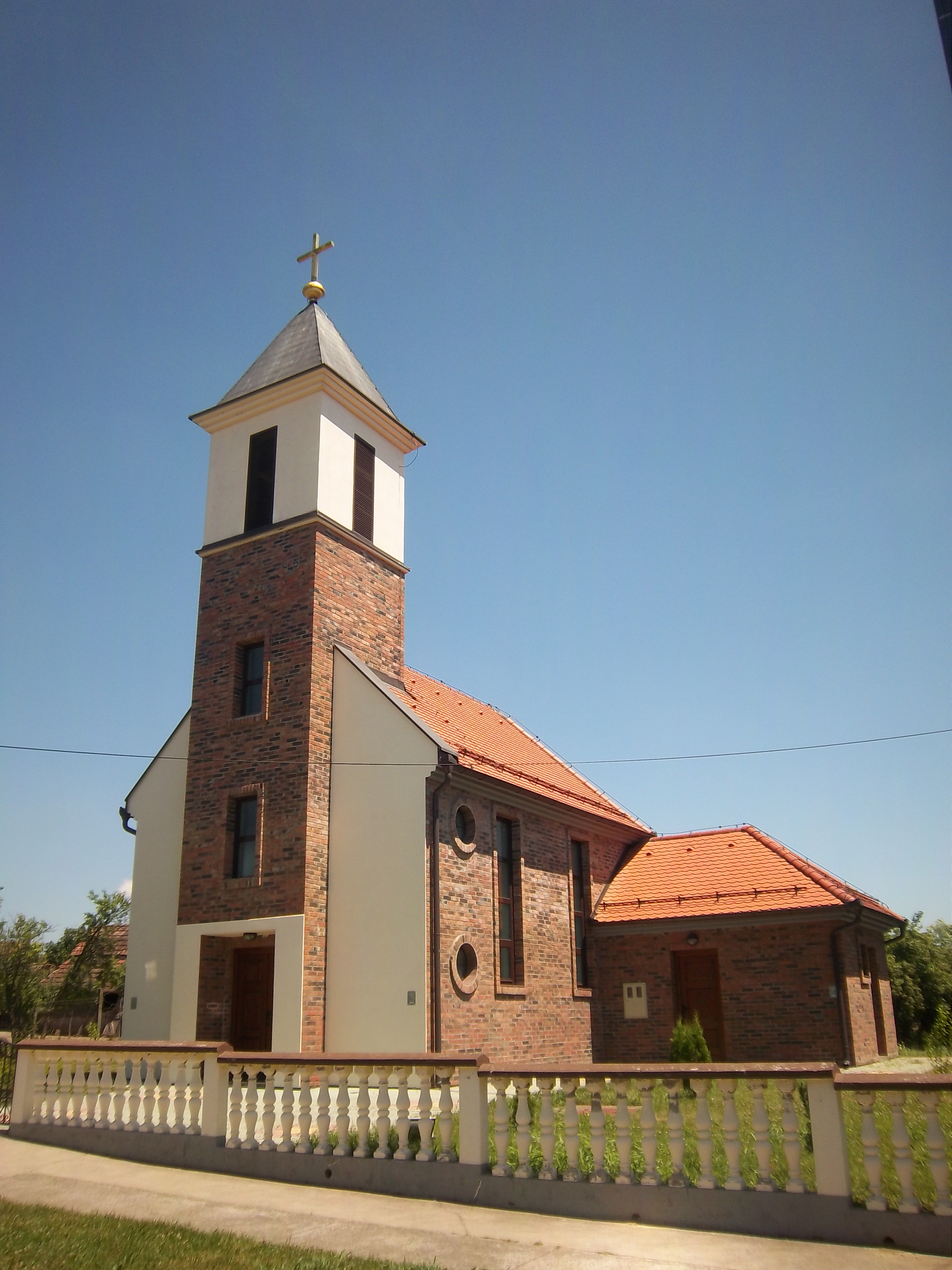 Srpskohrvatski / српскохрватски: Katolička crkva u Oroliku, Hrvatska